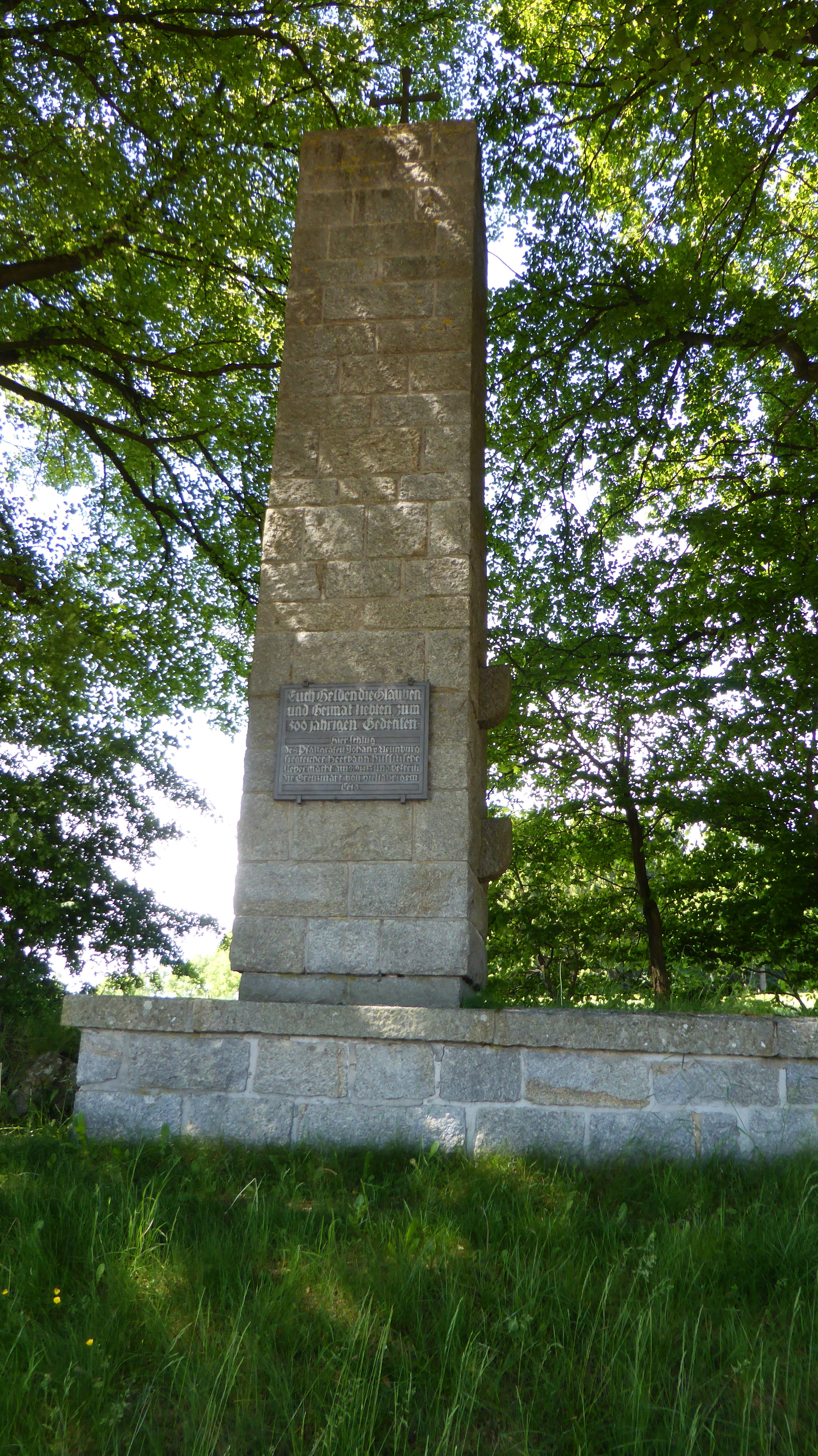 Denkmal zum 500-jährigen Erinnerung an die Schlacht von Hiltersried